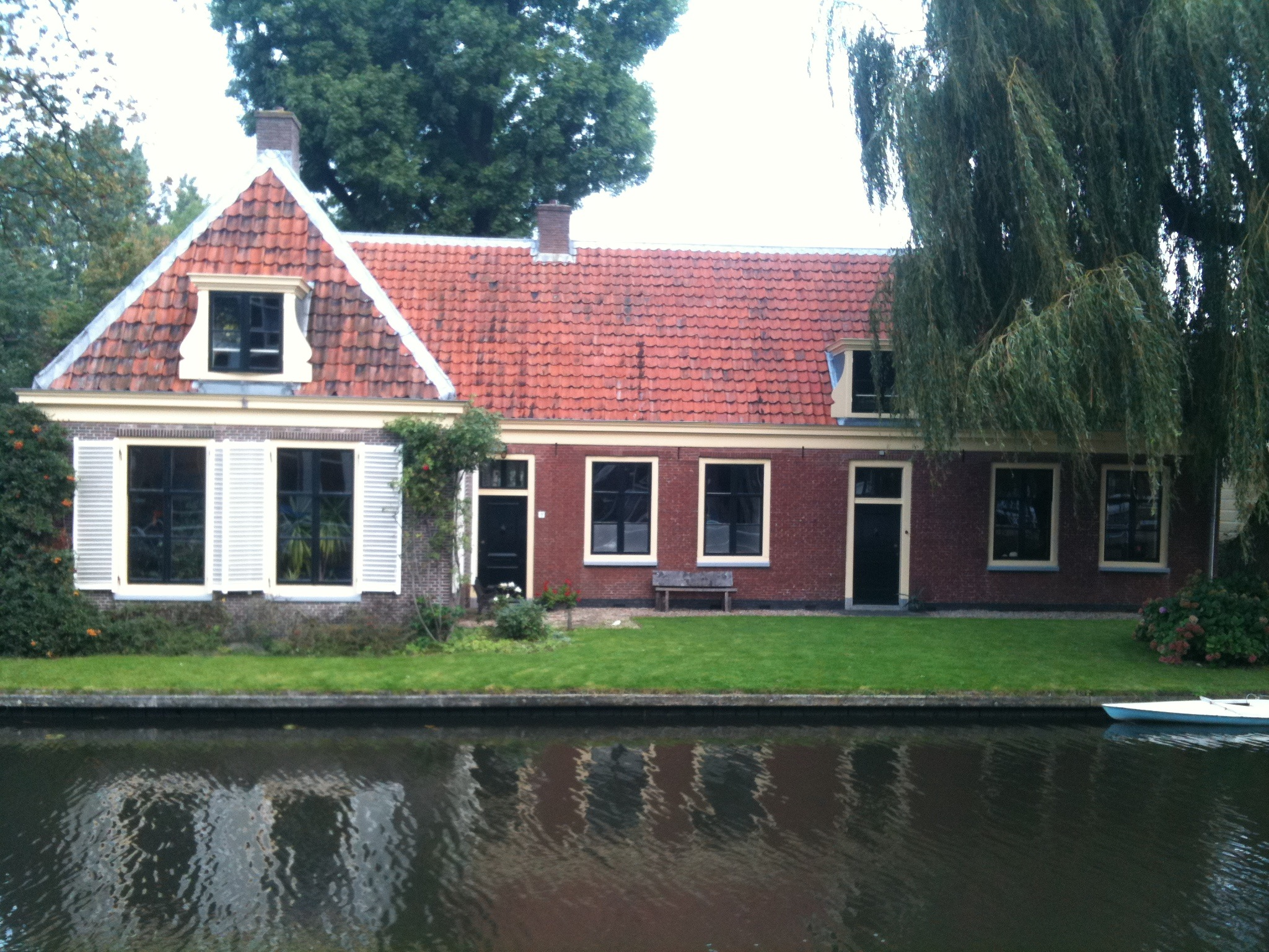 Terrein van "de Ster": molenaarshuis Utrecht